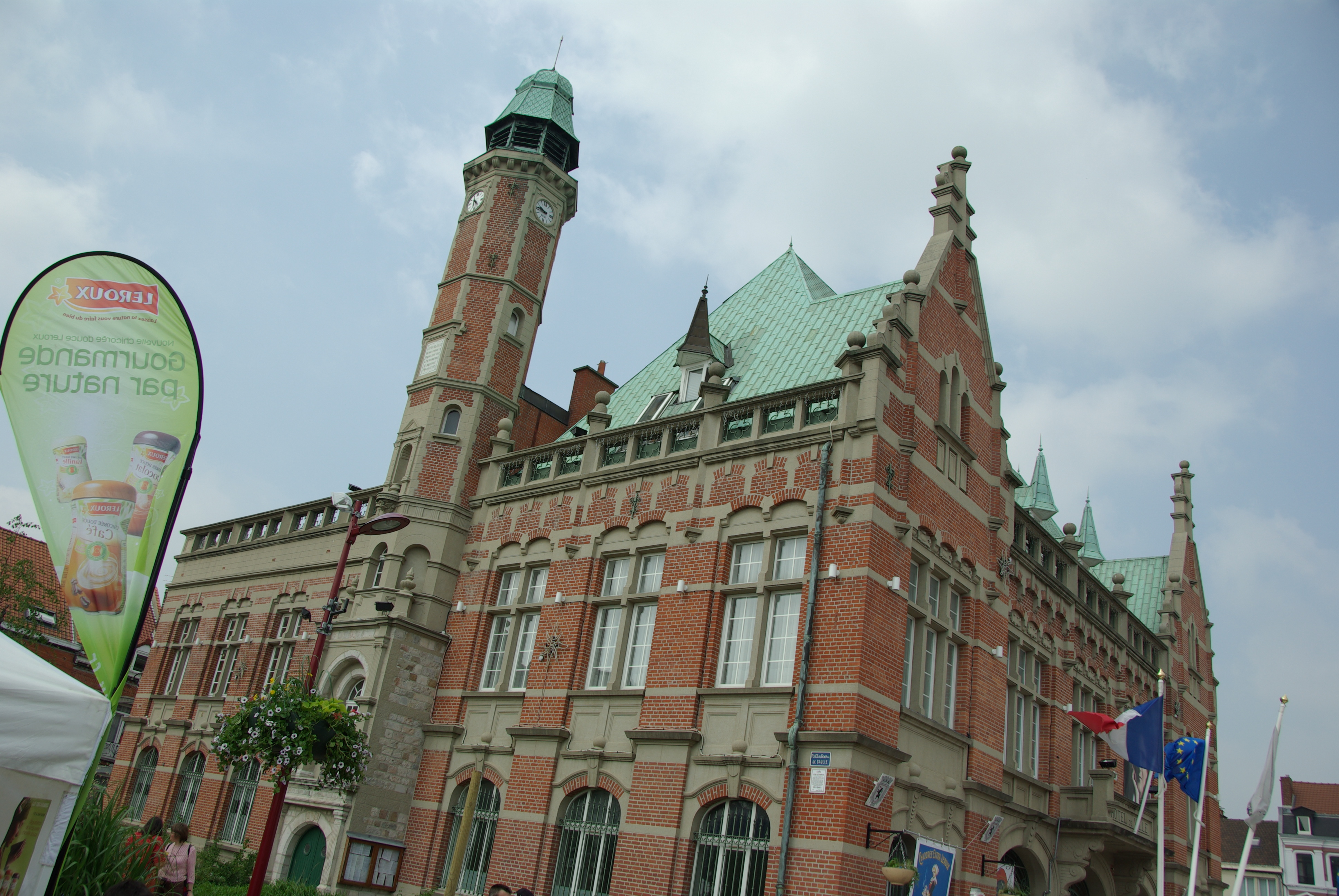 prise de vue lors des 1ères Chicoriades des 7 et 8 juin 2008.